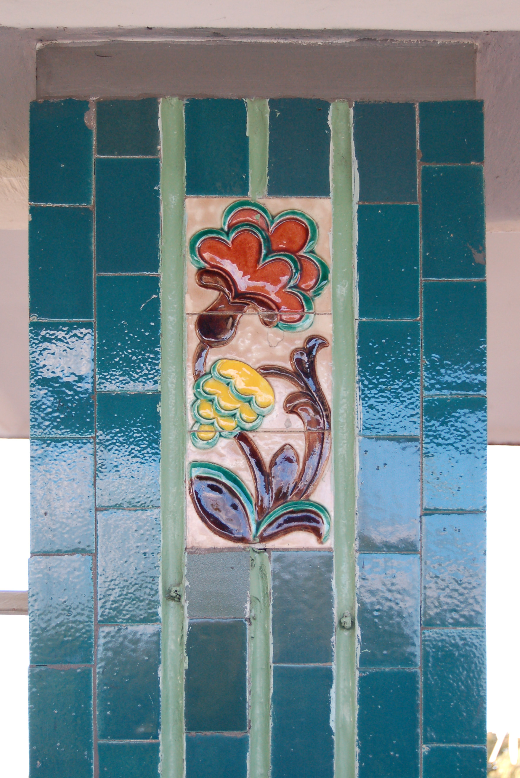 Станция метро «Гидропарк», декор на облицовочной плитке